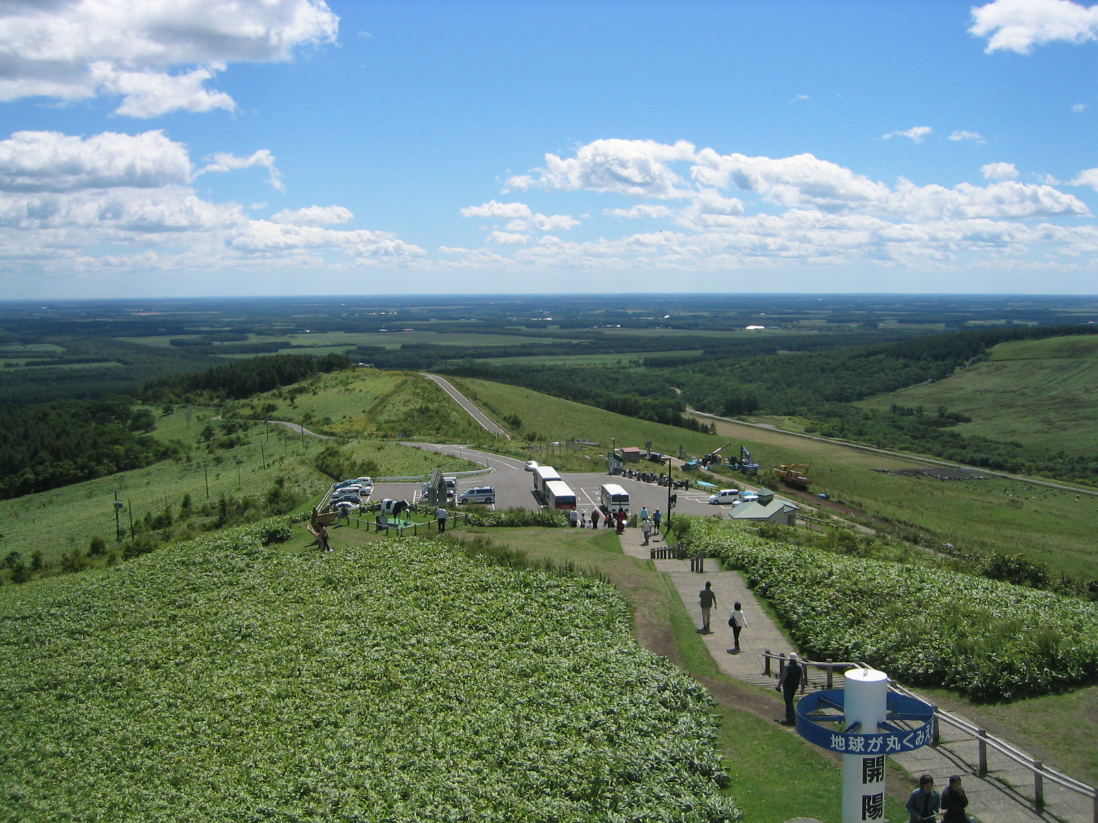 Kaiyodai, Hokkaido, Japan